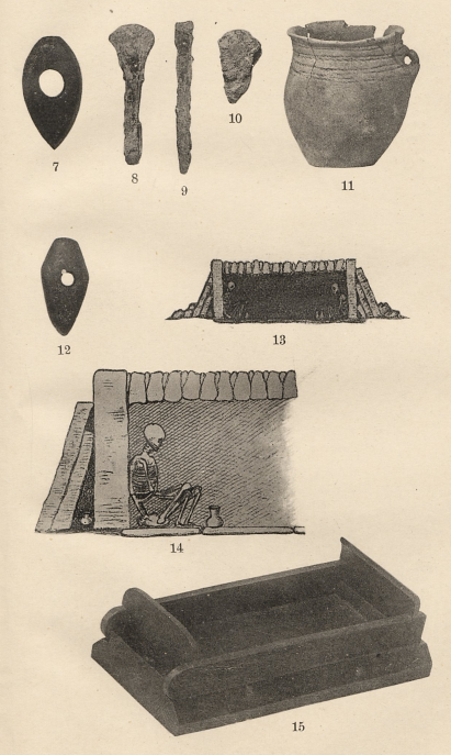 Fürstengrab von Helmsdorf